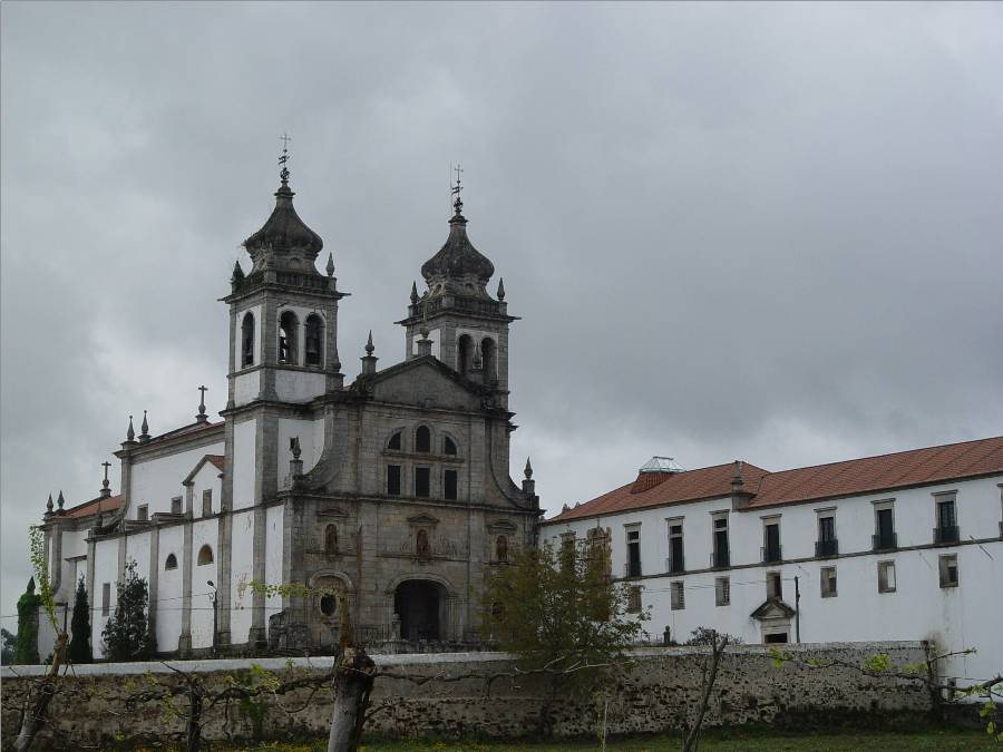 Foto do Mosteiro de Tibães, Braga, Portugal.